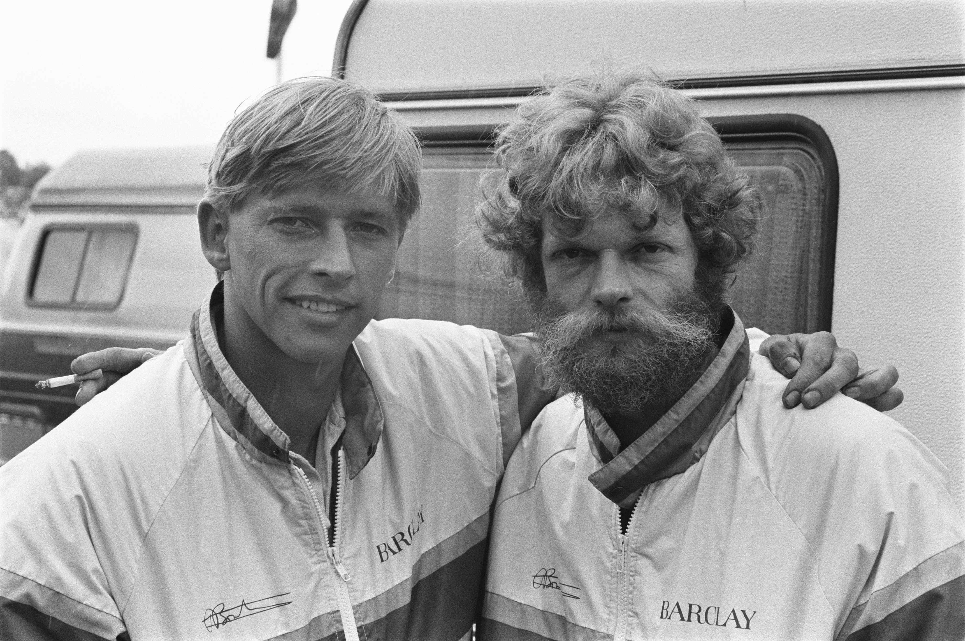 TT van Assen, zijspanrace; Egbert Streuer (r) en links Bernard Schnieders , koppen